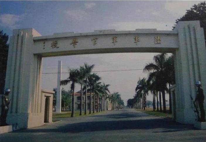 中華民國陸軍軍官學校遷台後高雄鳳山現址大門